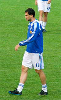 Vyntra 2008